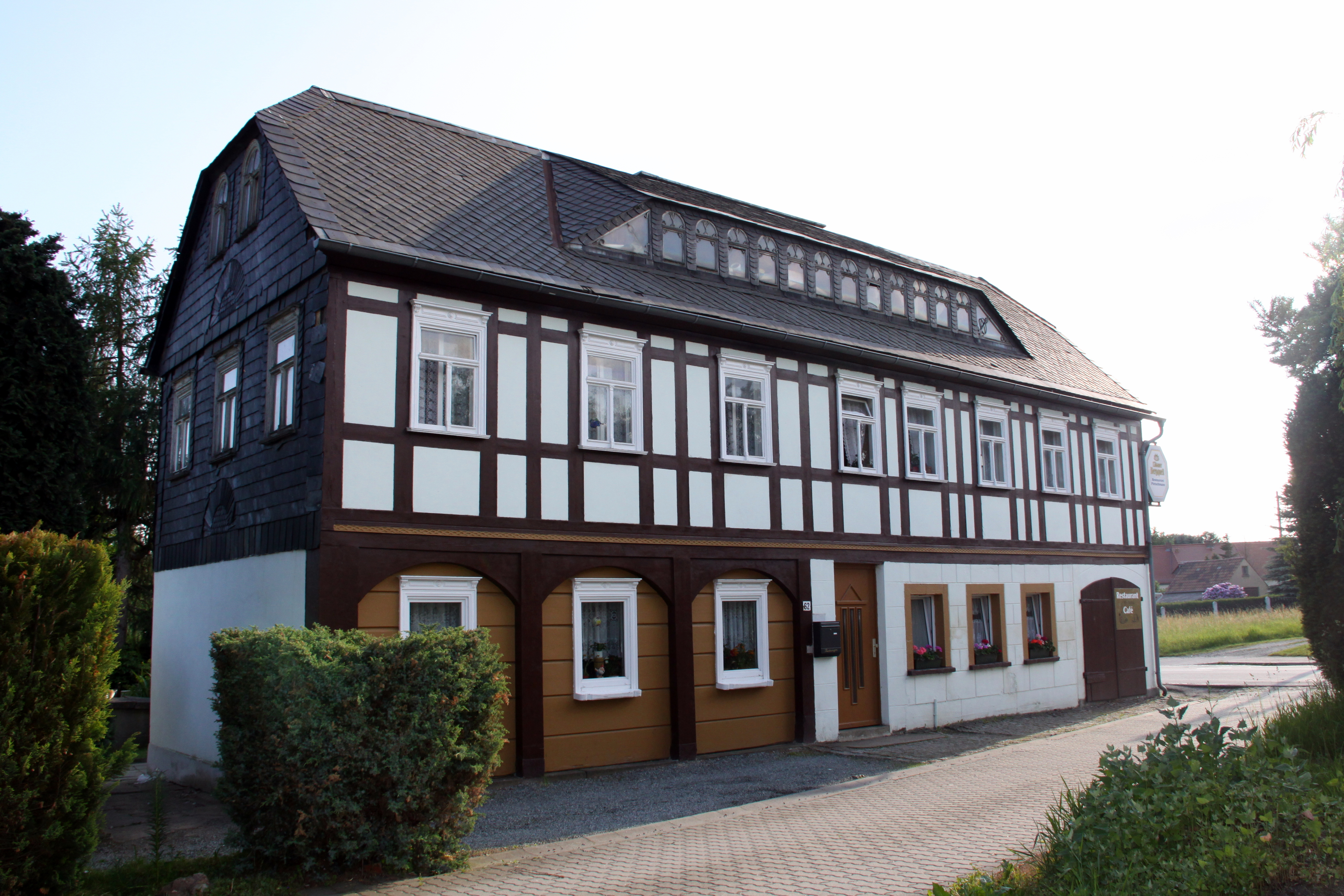 Umgebindehaus in Beierdorf, Löbauer Straße 62